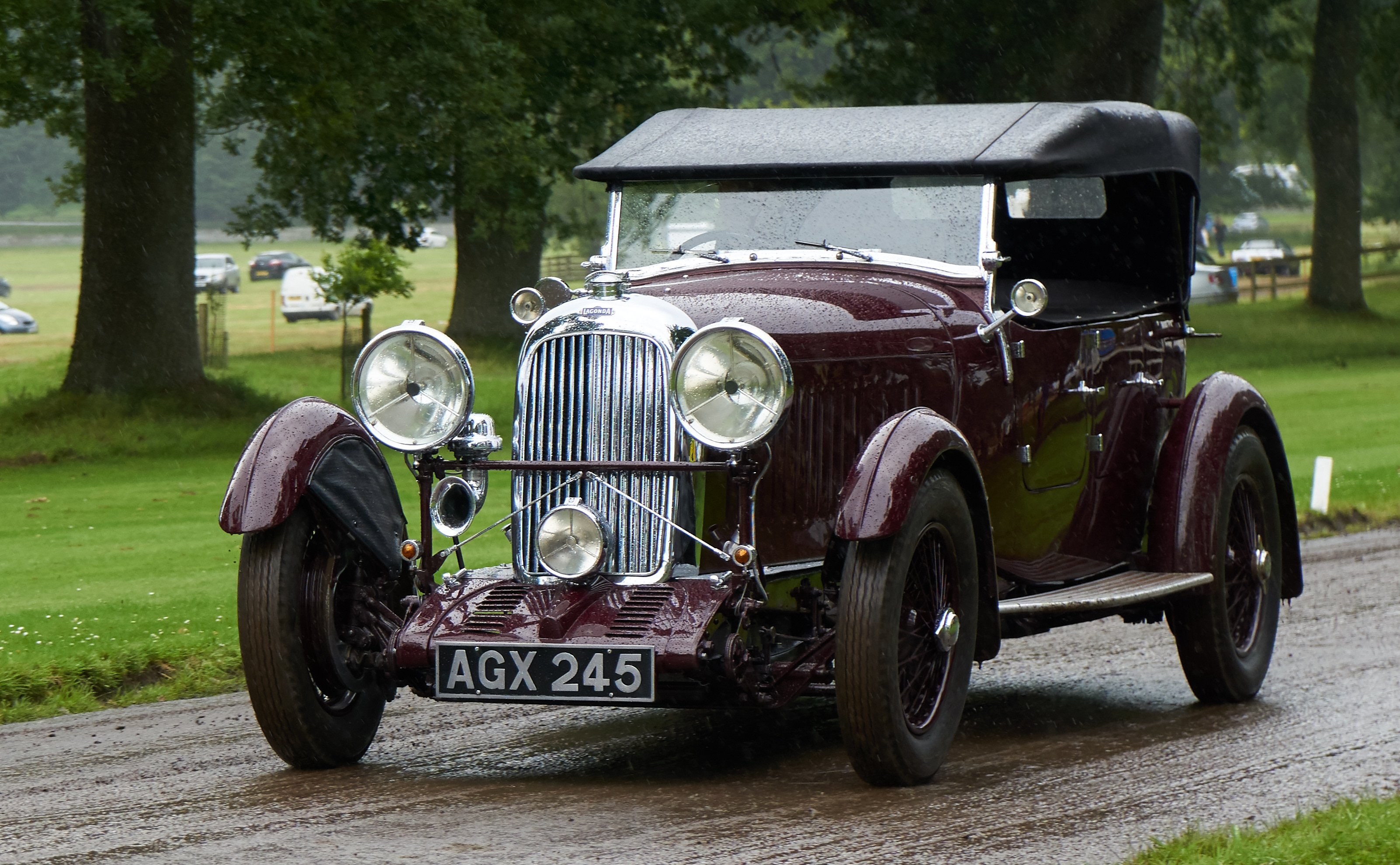 1933 Lagonda 16-80 1954 cc SVVC Extravaganza 2016